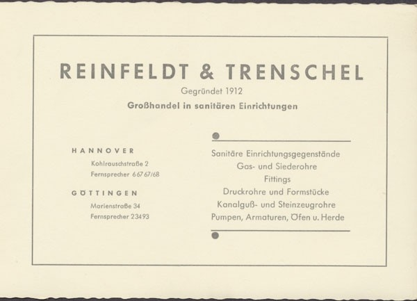 Revers einer Klappkarte mit einer Ansichtskarte vom Galeriegebäude am Großen Garten in Herrenhausen sowie unter anderem einer Aussenansicht der Fassade der - damaligen - Sanitär-Großhandlung Reinfeldt & Trenschel unter der Adresse „Kohlrauschstraße 1-4 Ecke Celler Straße“ ...